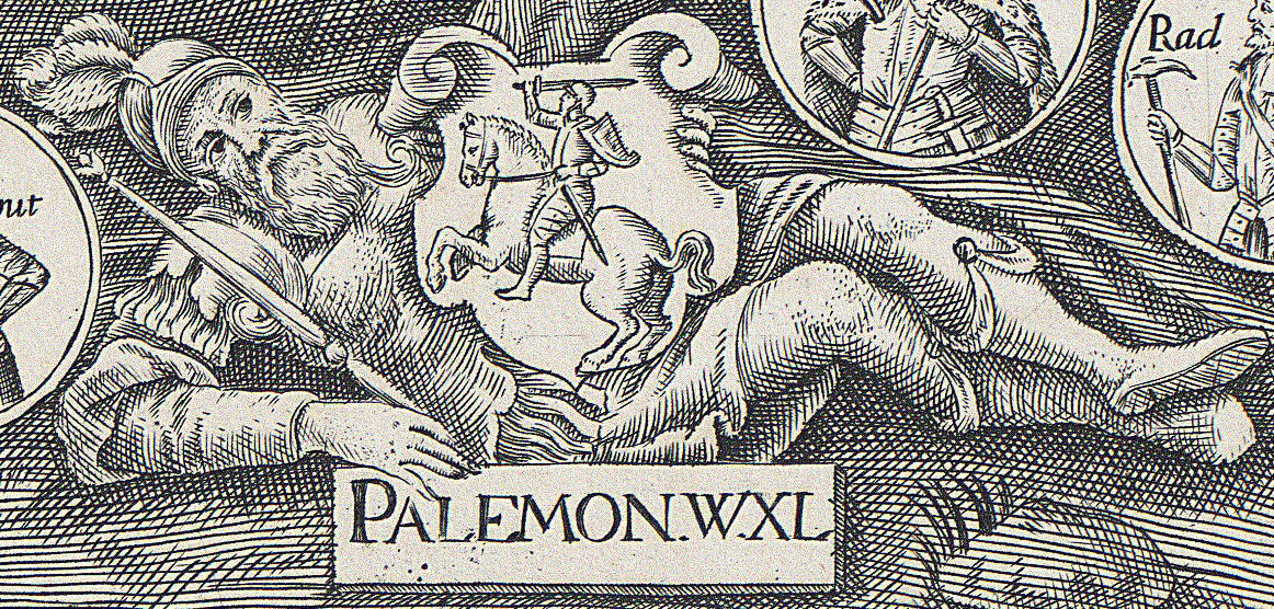 Беларуская (тарашкевіца): Уяўны партрэт легендарнага князя Палямона з гербам Пагоняй (Pahonia)